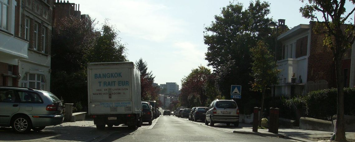 avenue Vandromme Auderghem Belgium